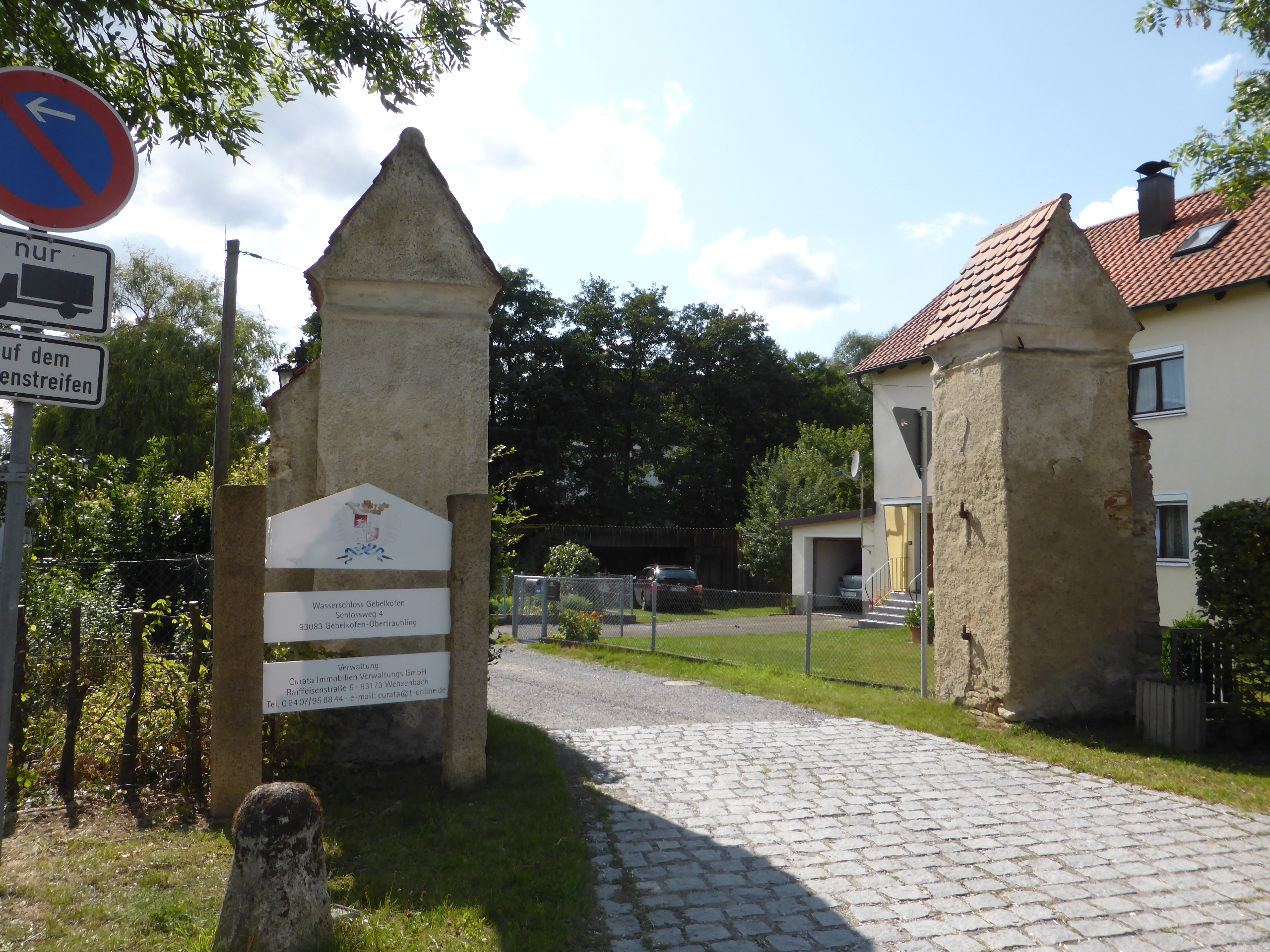 Wasserschloss Gebelkofen (Zufahrt)